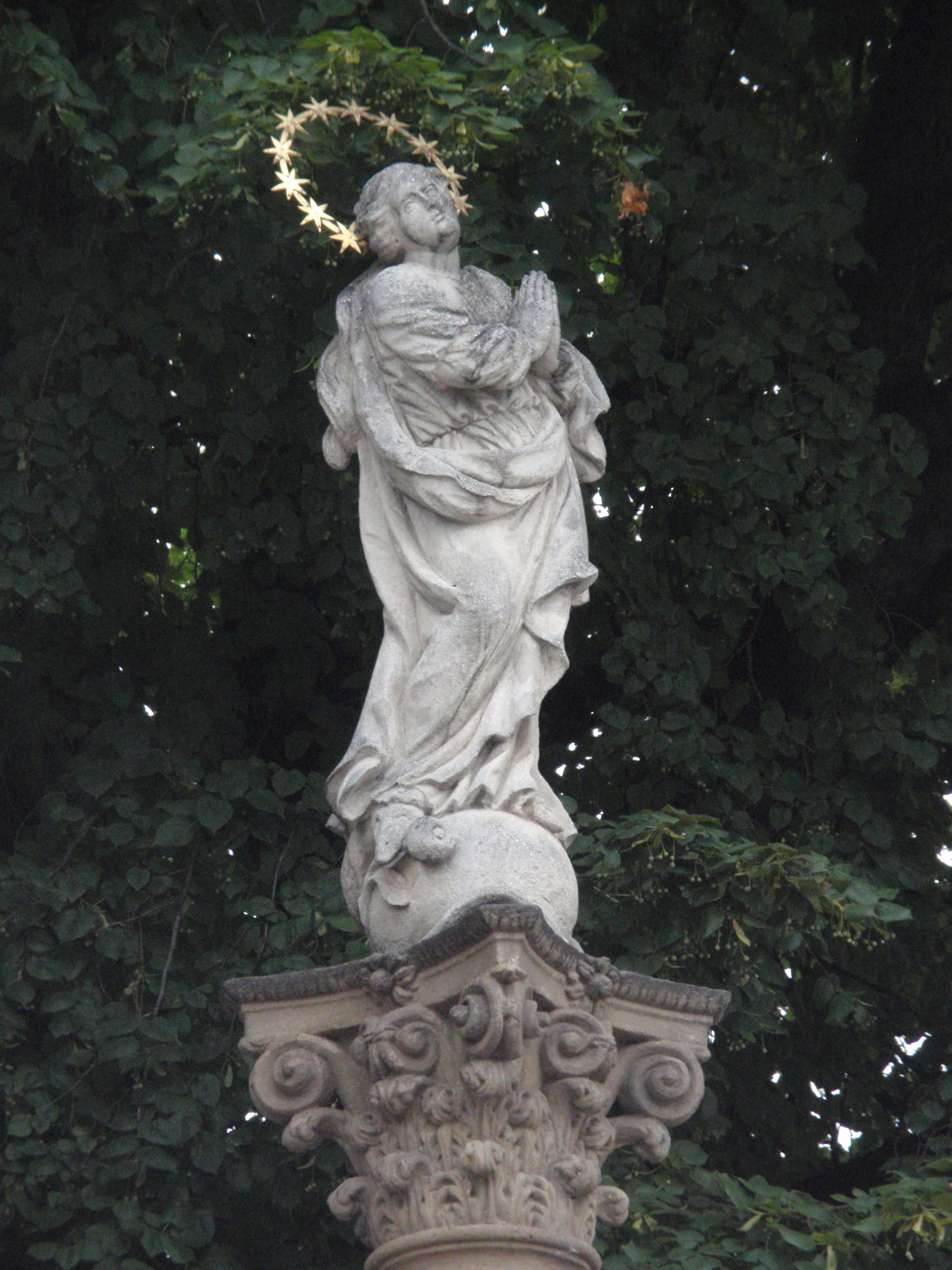 Sloup se sochou P. Marie (Uherský Brod), nám. Míru, Uherský Brod